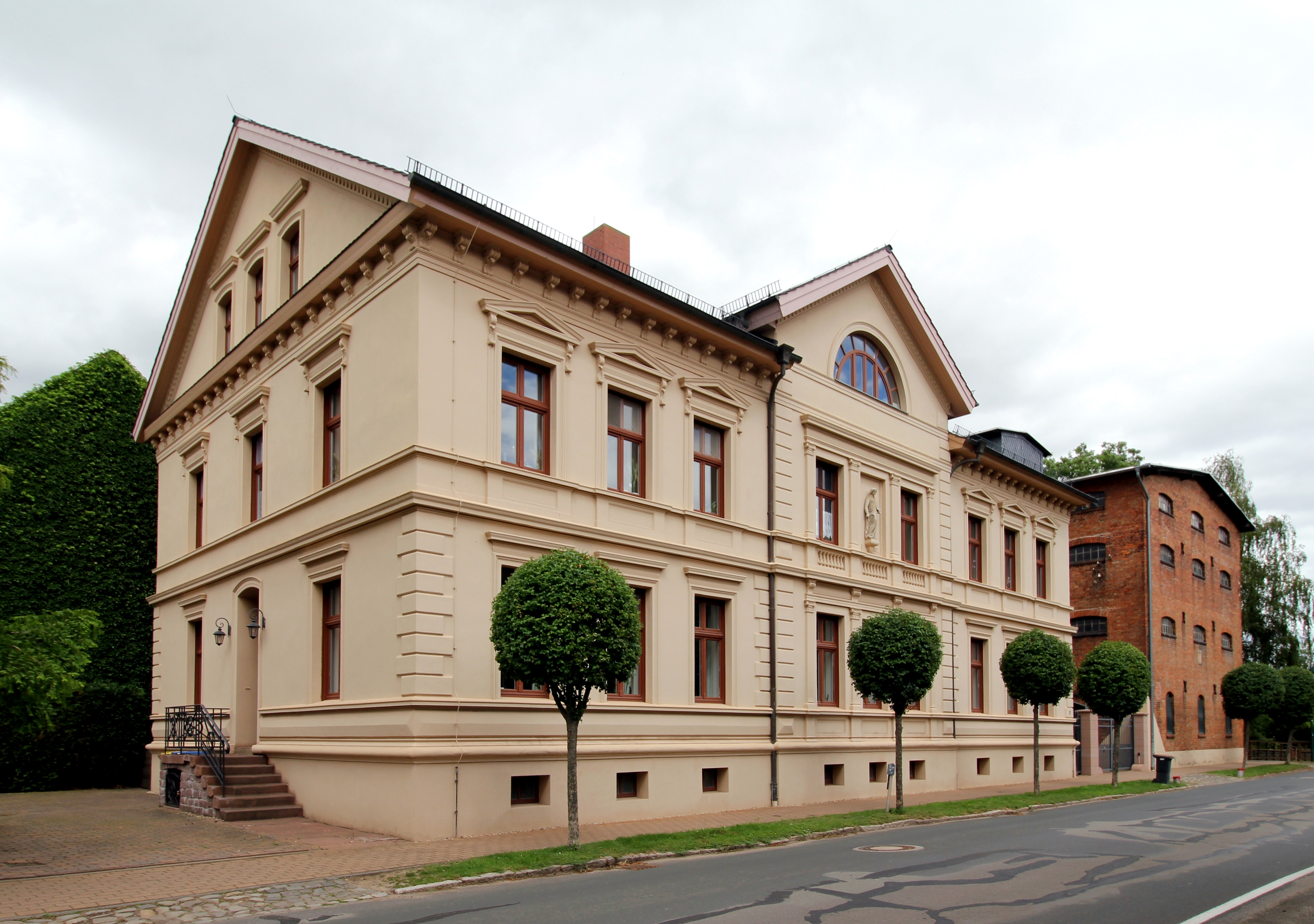 Bauernhof Groß Santersleber Straße 7-8 Schackensleben